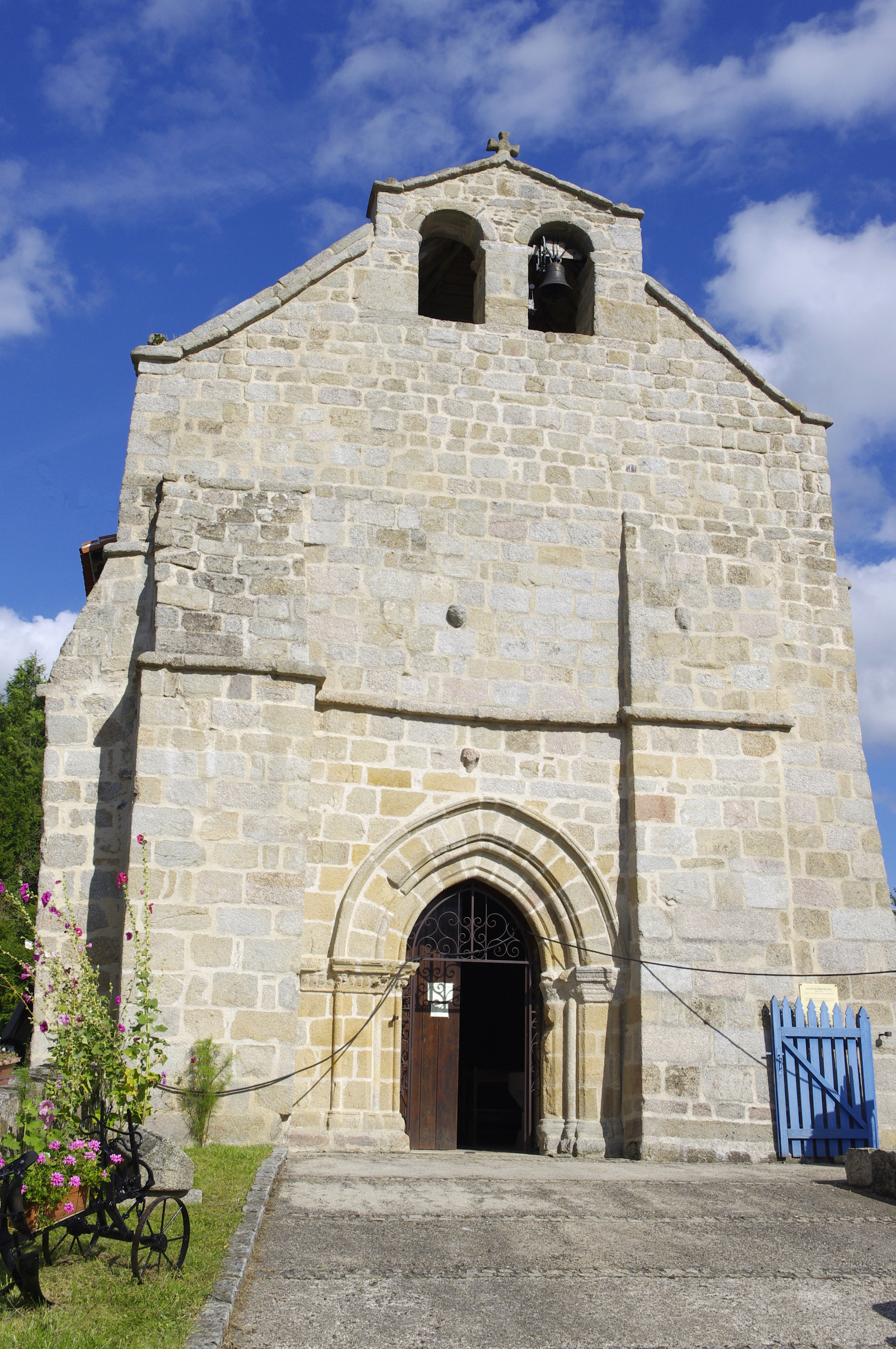 L'église de Breuilaufa